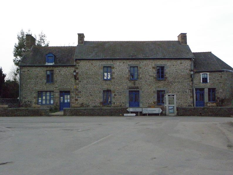 Mairie de Cuguen (35).